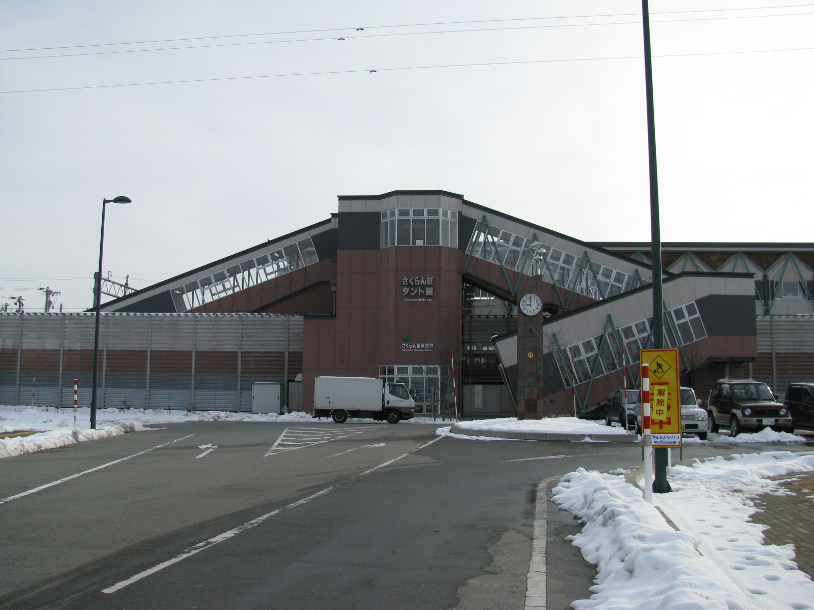 ja：さくらんぼ東根駅駅舎